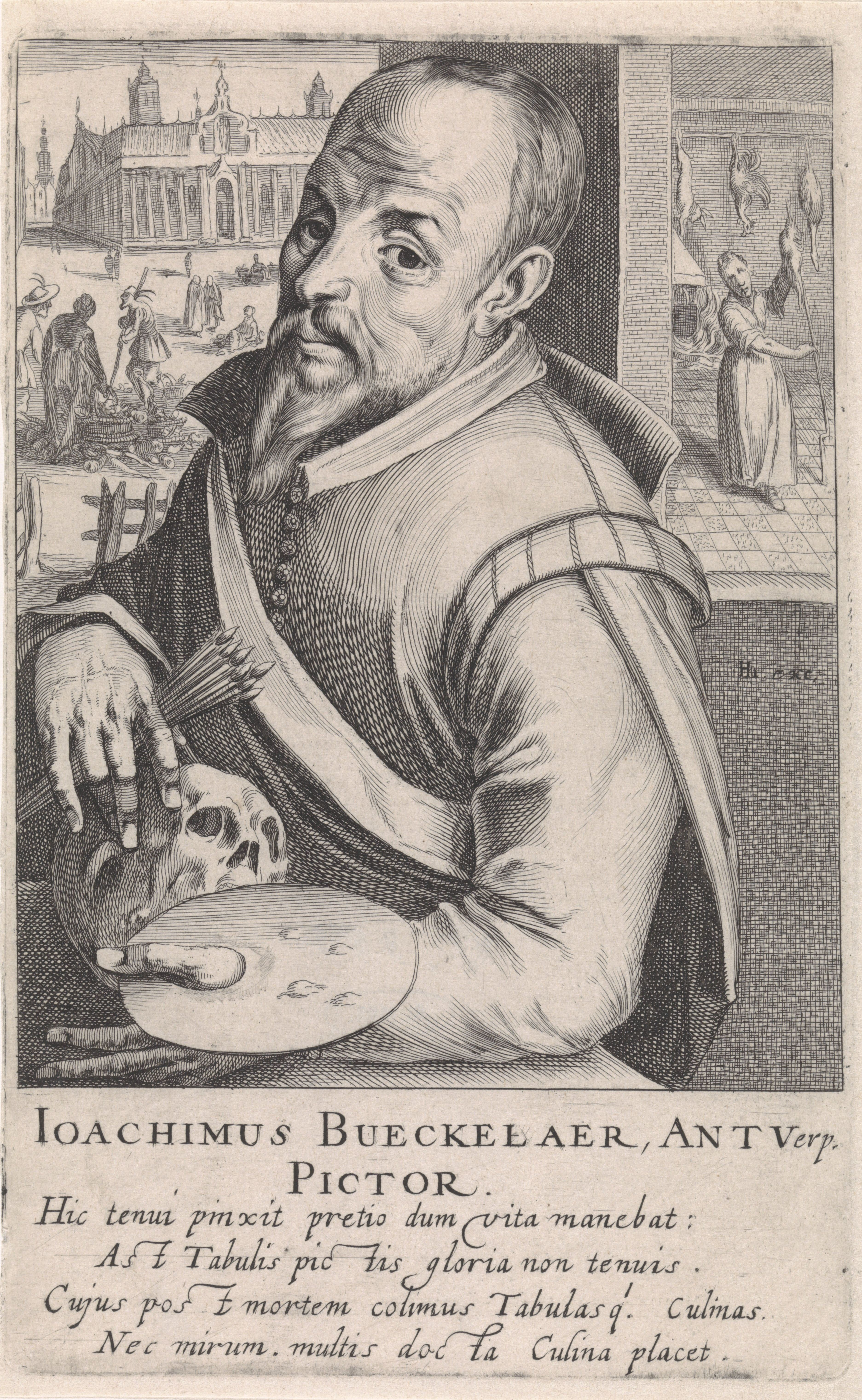 IdentificatieTitel(s): Portret van Joachim Beuckelaer. Ioachimus Bueckelaer, Antverp. Pictor. (titel op object) Pictorum Aliquot Celebrium Praecipuae Germaniae Inferioris Effigies (serietitel)Objecttype: prent Objectnummer: RP-P-1907-353Catalogusreferentie: Hollstein Dutch 148 New Hollstein Dutch 160 Hollstein Dutch 86-157 Opmerking: Hondius IFMP 800-aOpschriften / Merken: verzamelaarsmerk, verso, gestempeld: Lugt 2228Omschrijving: Portret ten halven lijve naar links van Joachim Beuckelaer. Onder het portret zijn naam en vier regels in het Latijn. Prent uit deel 2 van de serie Pictorum Aliquot Celebrium Praecipuae Germaniae Inferioris Effigies. Serie van 72 kunstenaarsportretten vervaardigd door Hendrick Hondius I, Simon Frisius, Andries Jacobsz. Stock en Robert de Baudous.VervaardigingVervaardiger: prentmaker: Simon Frisius - uitgever: Hendrick Hondius (I) (vermeld op object)Plaats vervaardiging: Den HaagDatering: 1610Fysieke kenmerken: ets en gravureMateriaal: papier Techniek: etsen / graveren (drukprocedé)Afmetingen: plaatrand: h 197 mm × b 124 mmOnderwerpWat: portrait, self-portrait of painterWie: Joachim BueckelaerVerwerving en rechtenVerwerving: aankoop 1905Copyright: Publiek domein